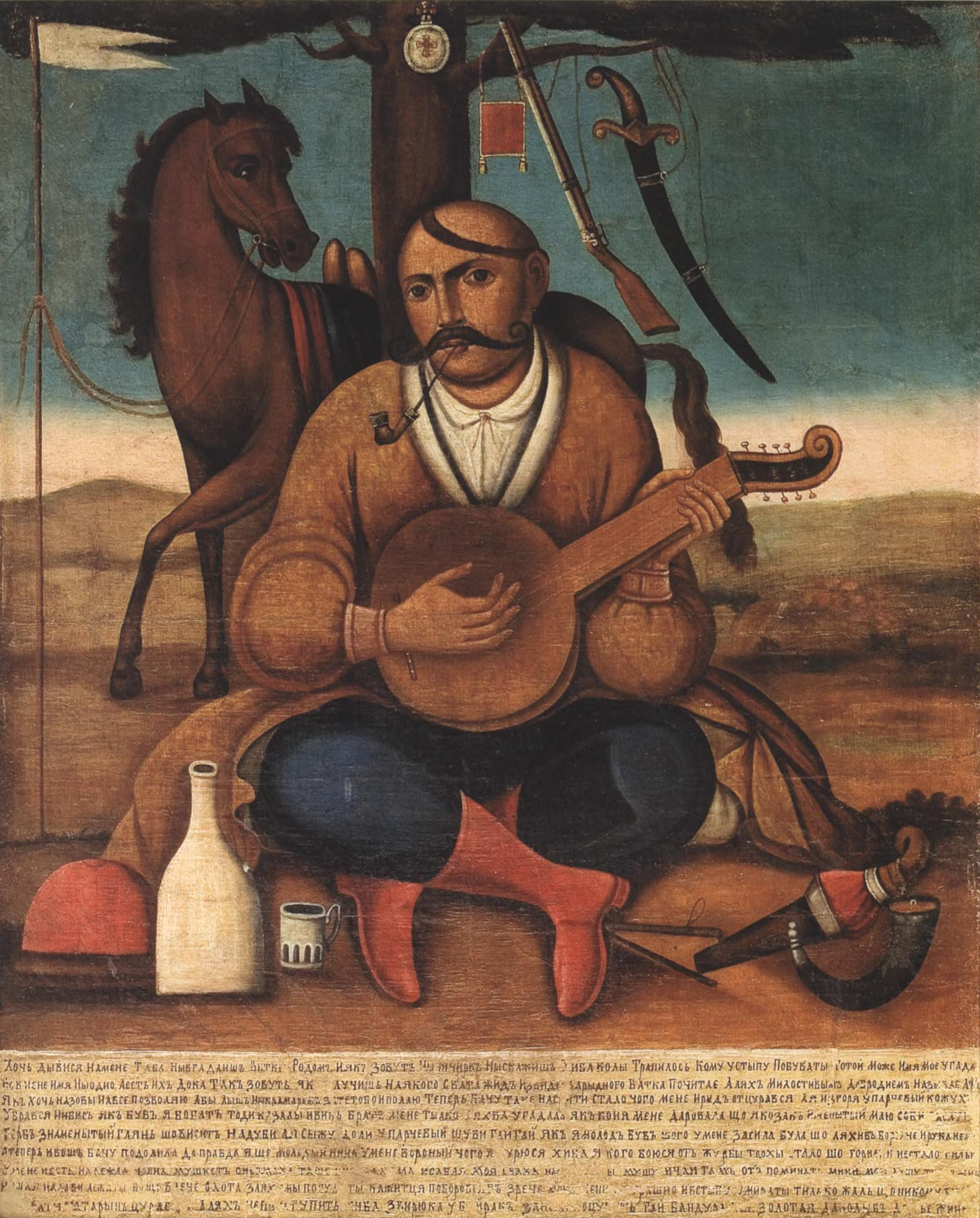 Козак Мамай, кін. XVIII - поч. XIX ст. Походження невідоме Полотно, олія, 100 x 81 Львівський історичний музей Напис під зображенням: “Хочь Дывися на мєнє Та ба Нывгадаишъ Витки Родомъ И якъ Зовутъ Нычичиркъ Ныскажишъ Хиба колы Трапилось Кому устыпу Побуваты То той Можє Имя Моє угада Бо в мєнє Имя Ны одно Аєсть ихъ Дока Такъ зовуть якъ лучишь Наякого Свата жидъ Извидэ за рыдного Батка Почитаэ А ляхъ Милостивымъ Добродиємъ Называє Ачъ Якъ хочь назовы навсє Позволяю Абы Лышъ Ныкрамарємъ затє тобои полаю Тєпєрь Бачу такє насвити стало чого мєнє Иридъ отцурався Ая Из горя у парчєвый кожухъ Убрався Нивись Якъ бувъ я богатъ тоди казалы и викъ Братє мєнє Тылко а хба угадала якъ коня Мєнє Даровала що я козакъ Имєнытый Маю соби ... Гєрбъ знамєнытый глянь шо висить на дуби а я сыжу доли у парчєвый шуби Гай Гай якъ я молодъ Бувъ того у мєнє Засила була шо ляхивъ Борючє И рука нєма А тєпєръ и вошъ бачу подолила Да правда я ше молодый кинь у мєнє вороный чого я журюся хиба я кого боюся отъ журбы трохы стало шо горим и нє стало тилько У мєнє и єсть надєжда Тавна мушкєтъ ... и сабля моя сваха...""